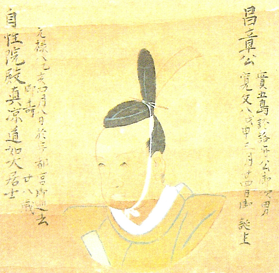 奥平昌章の肖像。